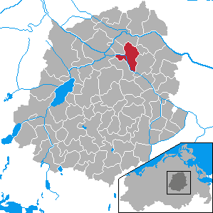 Siedenbrünzow, Landkreis Demmin, Mecklenburg-Vorpommern